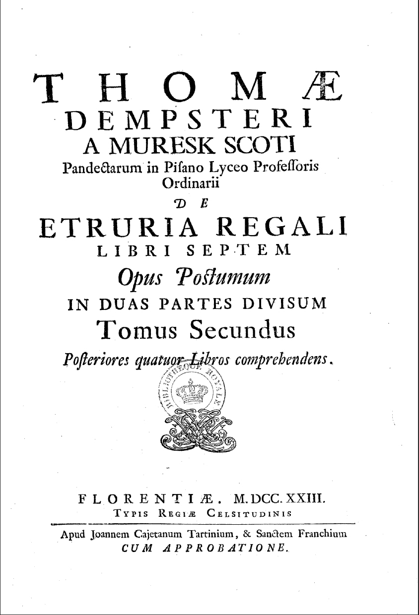 Couverture de livre De Etruria Regali Libri VII Thos Demster